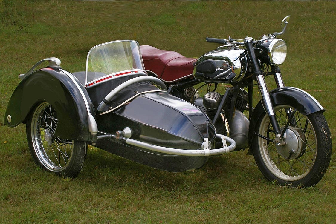 Motorrad von Victoria-Bergmeister mit Beiwagen